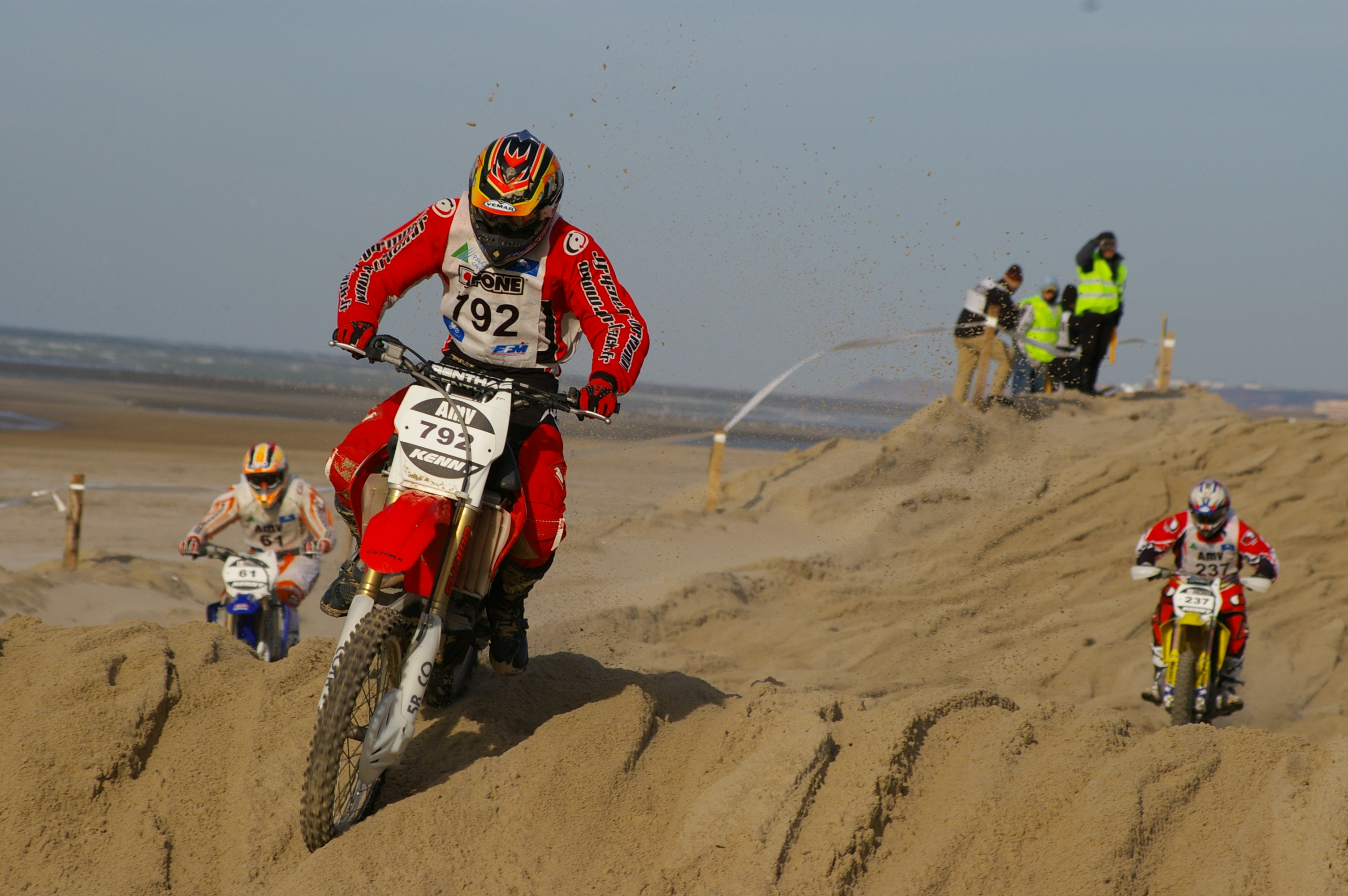 Enduropale 2008 Le Touquet